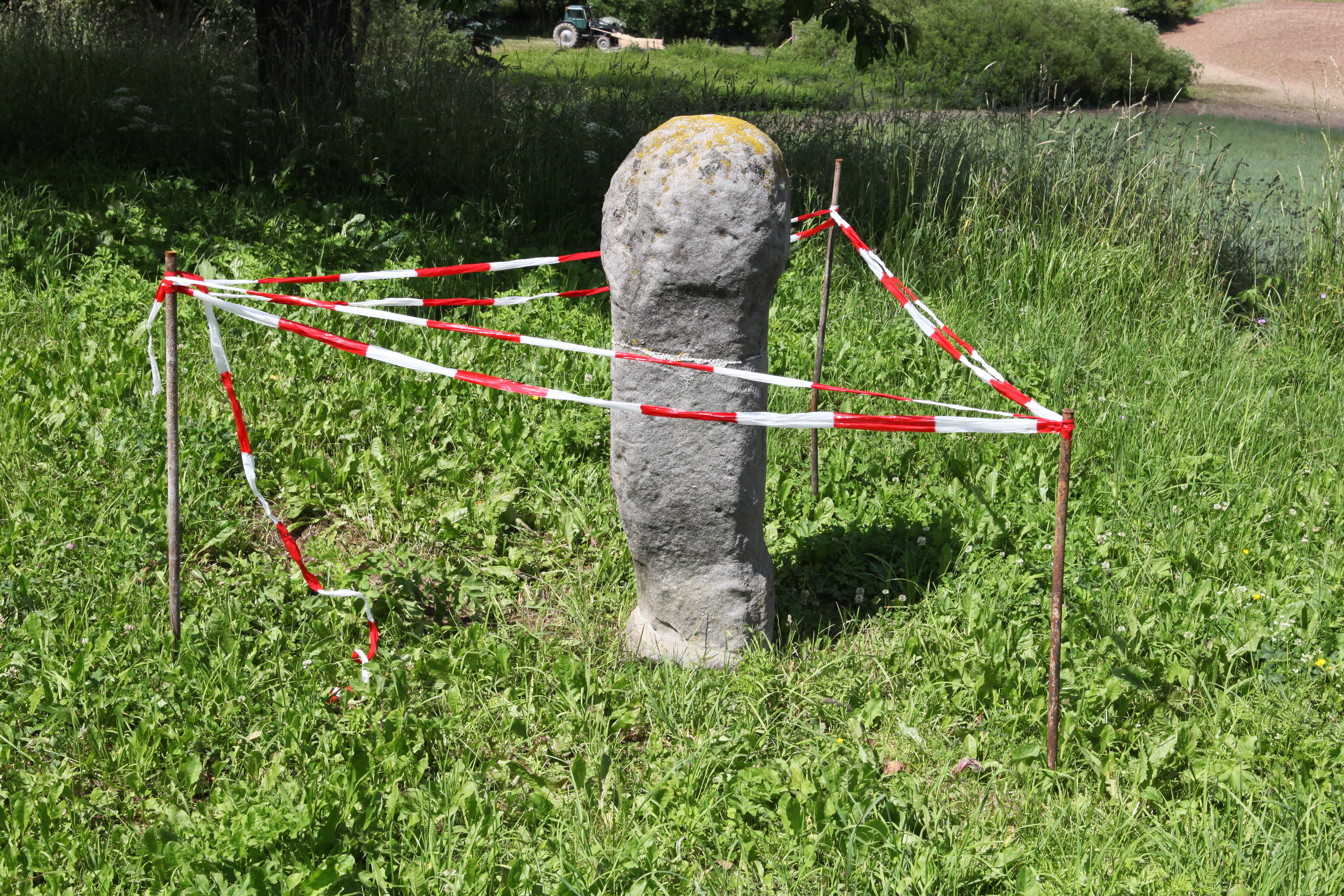 Docke in Welchendorf Gemarkung von Seltendorf, OT von Frankenblick, Thüringen